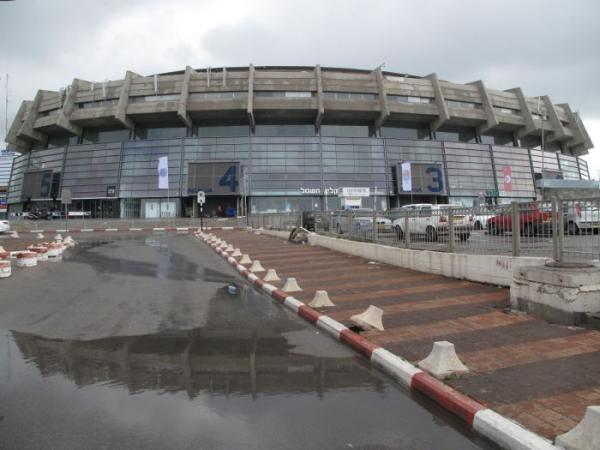 אצטדיון הכדורסל בתל אביב